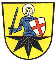 Wappen der ehemaligen Stadt Mengeringhausen